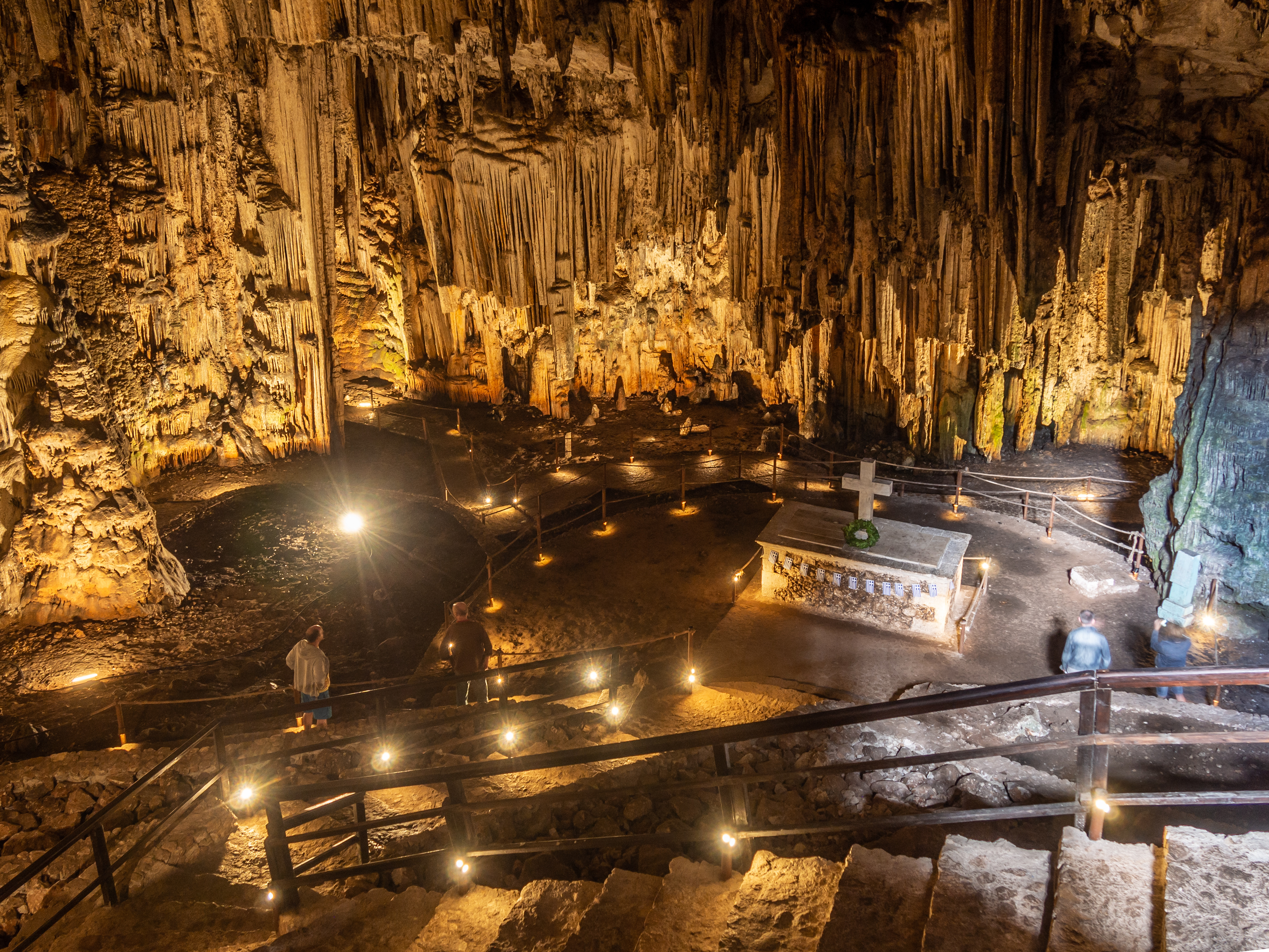 Σπήλαιο Μελιδονίου«Σπήλαιο Μελιδονίου»